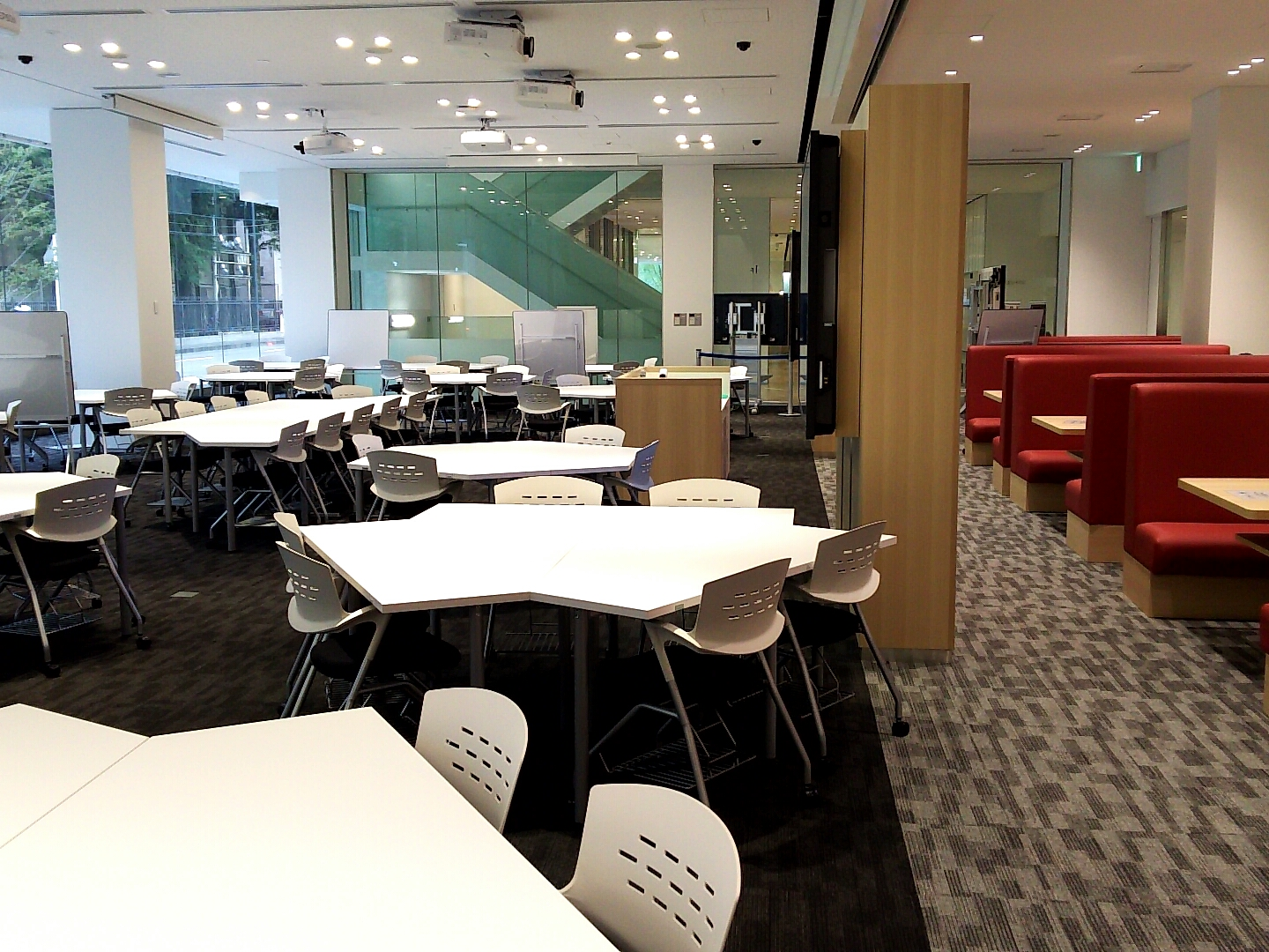 東北学院大学ラーニングコモンズ「コラトリエ」